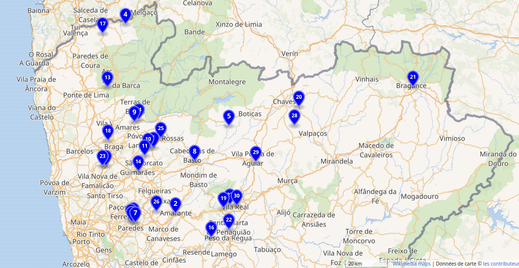 Mapa da localização das terras da Comenda de Oriz, primeira comenda da Ordem de São Bento de Avis.